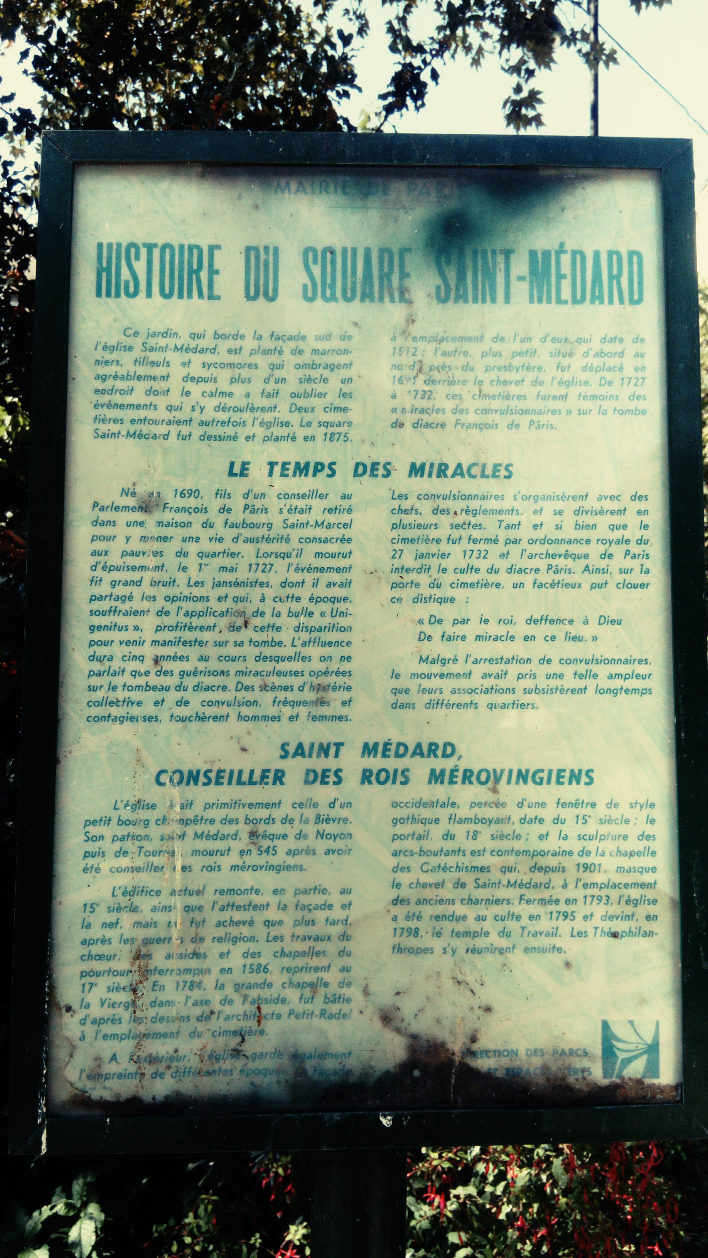 Panneau relatant l'histoire du square Saint-Médard, situé rue Mouffetard dans le 5e arrondissement à Paris. Installé par la mairie de Paris.